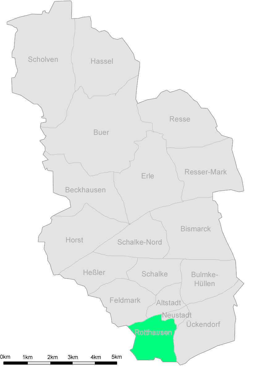 Beschreibung: Von Marc Schuelper erstelle Karte von Gelsenkirchen mit den 18 Stadtteilen. Stadtteil Beckhausen markiert. Description: By Marc Schuelper provided map of Gelsenkirchen with its 18 quarters. Highlighted quarter Beckhausen.